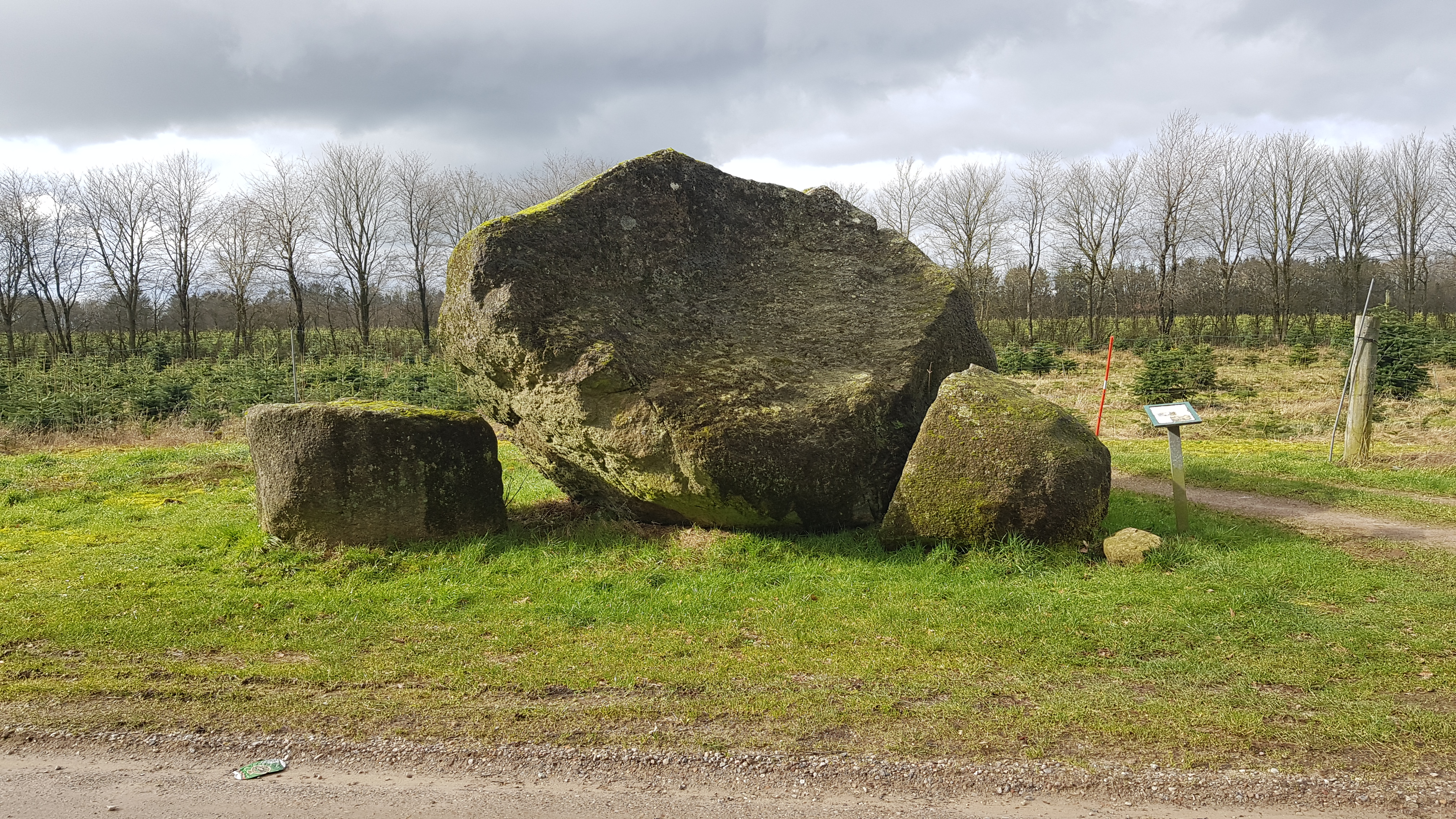 Hamborggårdstenen